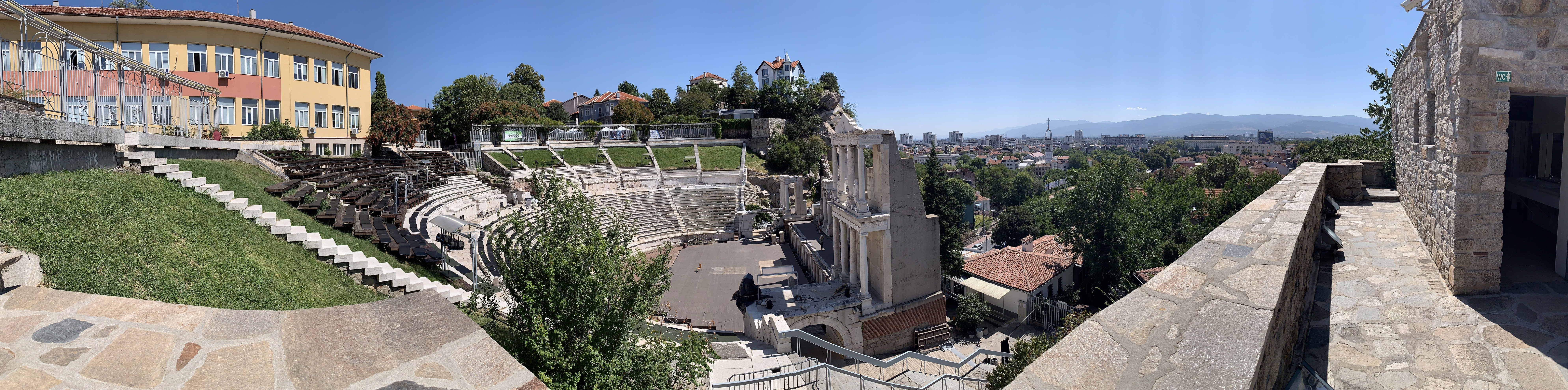 Античен театър Пловдив